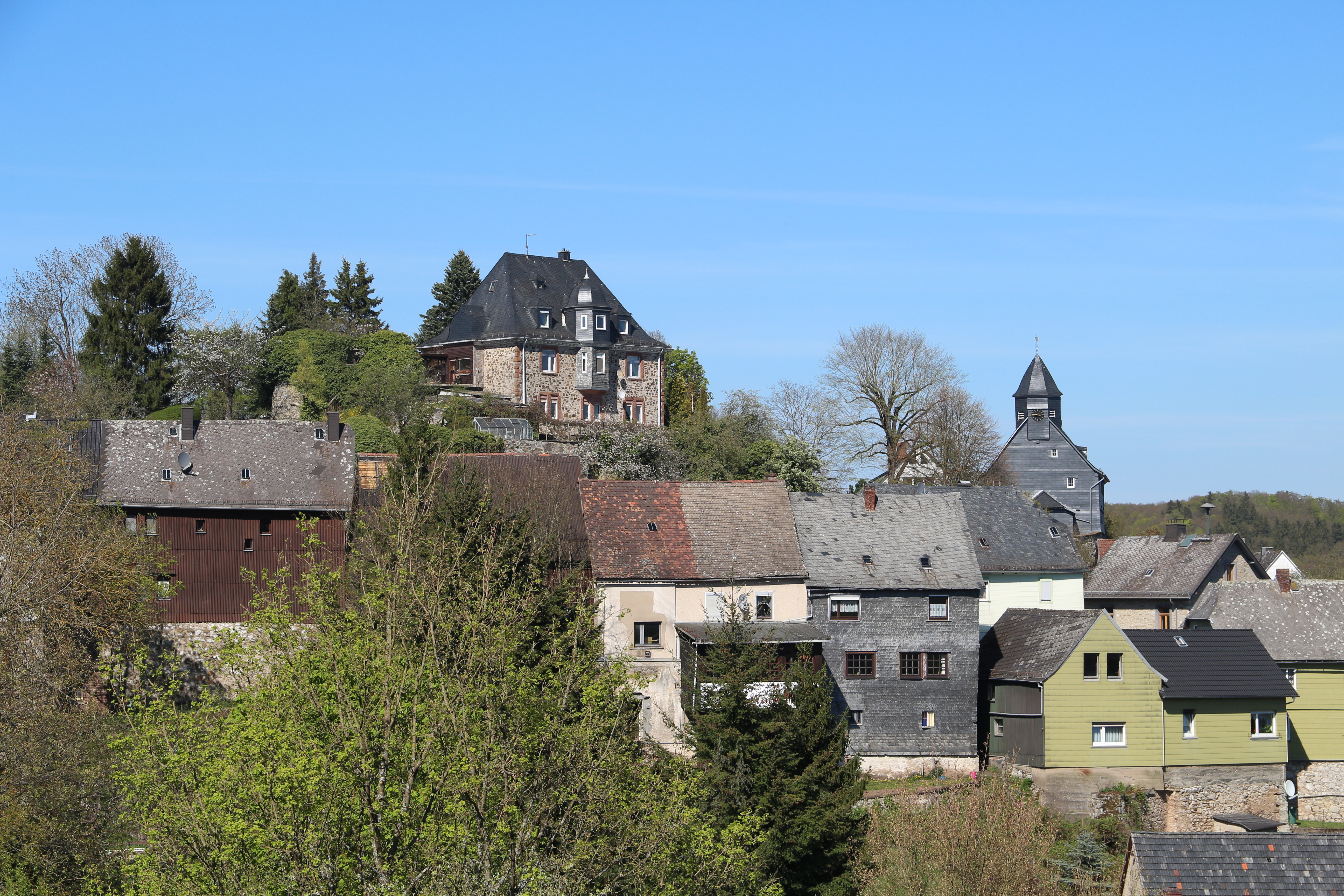 Burg